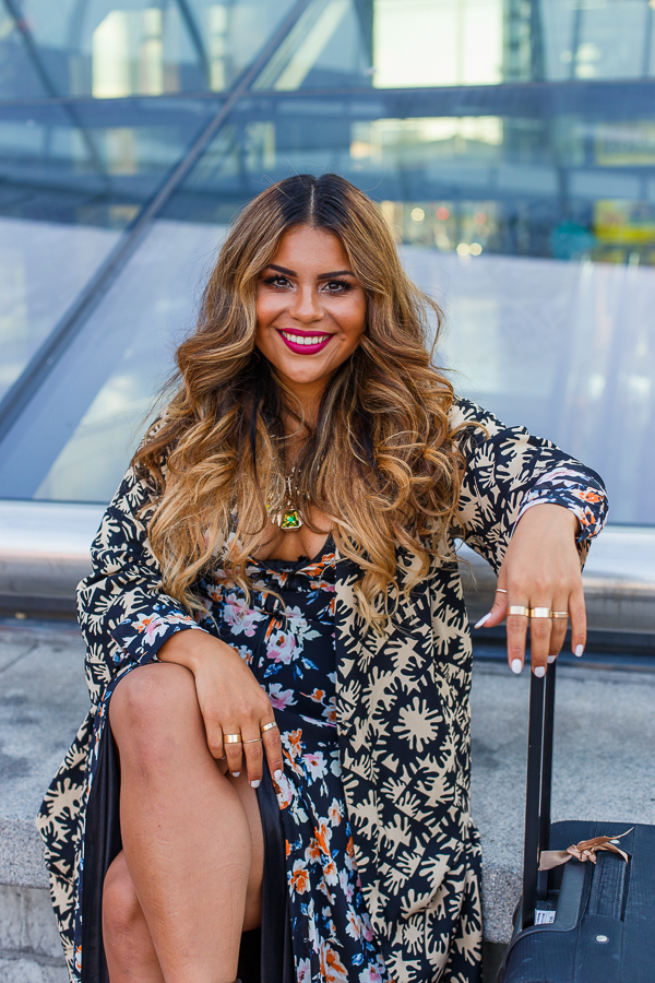 Fotografering utanför Malmö centralstation